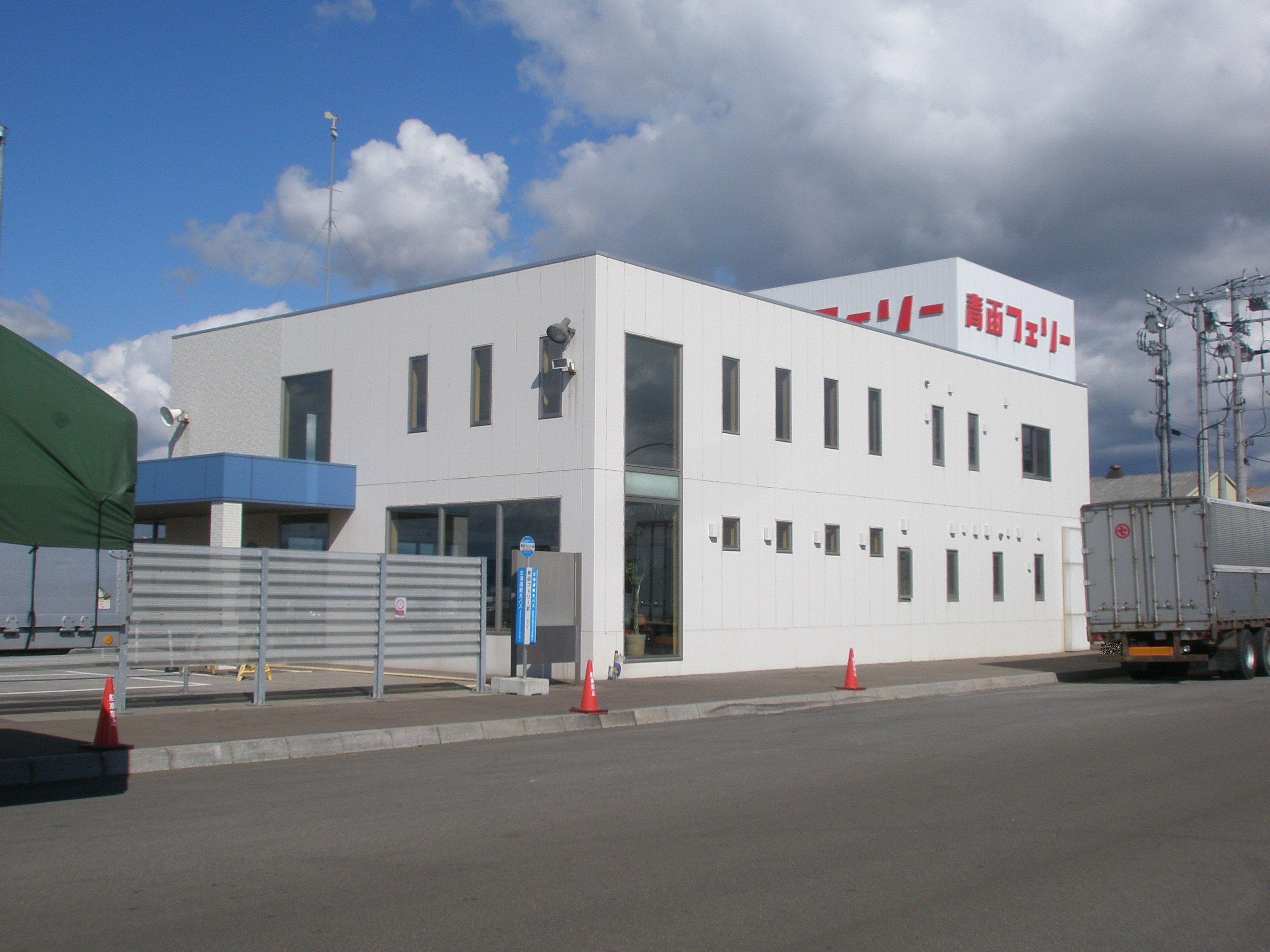 青函フェリー函館ターミナル-1、中央付近には北海道観光バスのバス停（のりば）